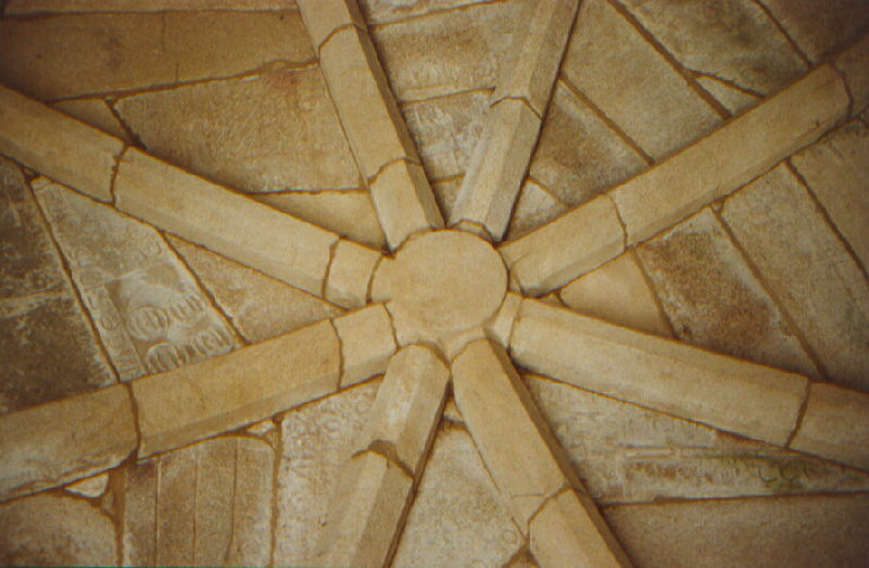 Mosteiro de Oseira, San Cristovo de Cea, Galiza'Mosteiro de Oseira'